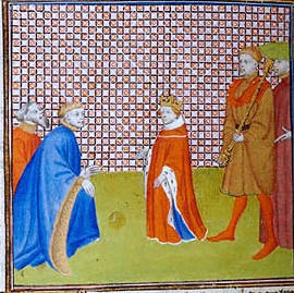 Clovis II.